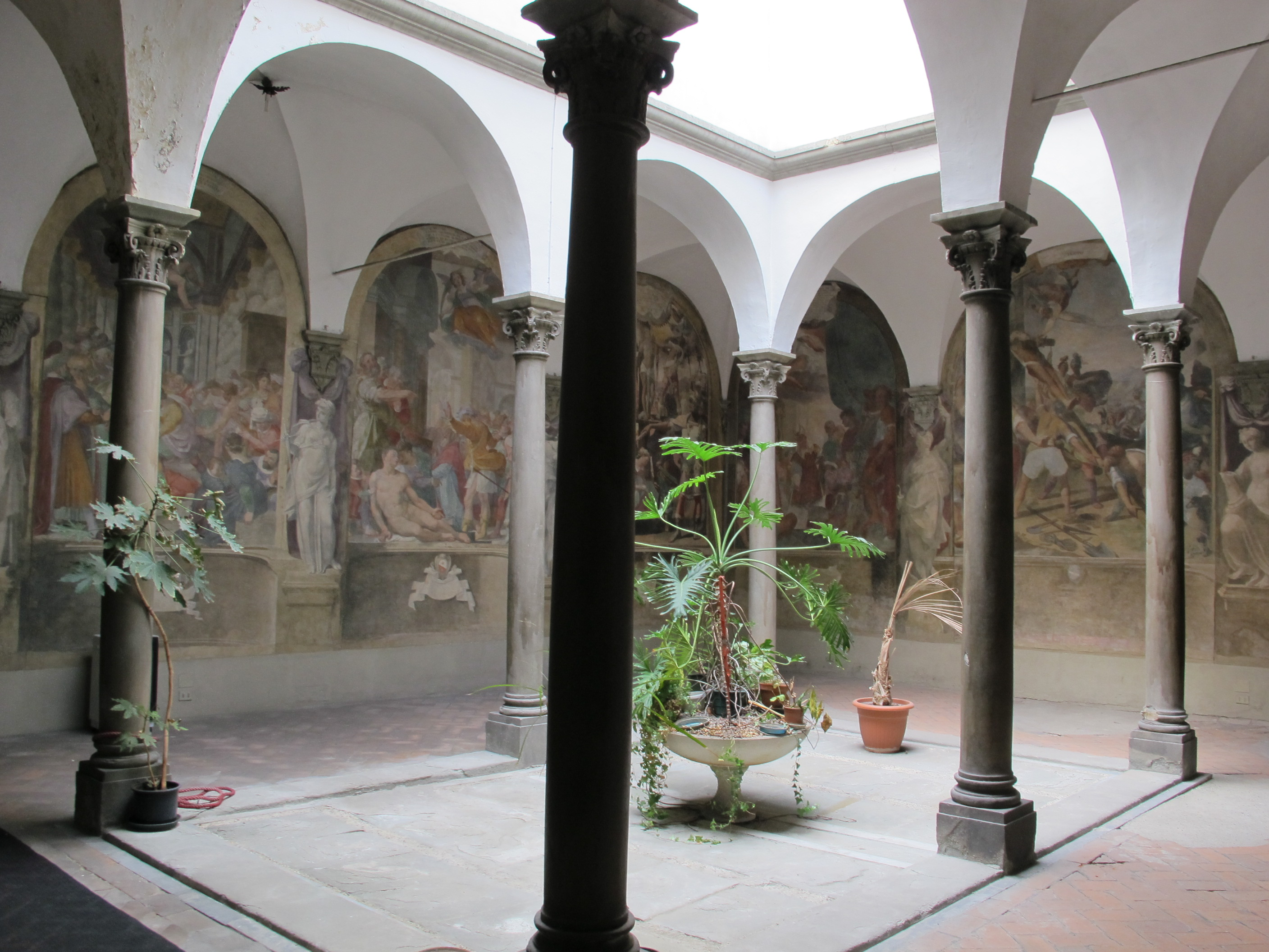 Chiostro di san pierino